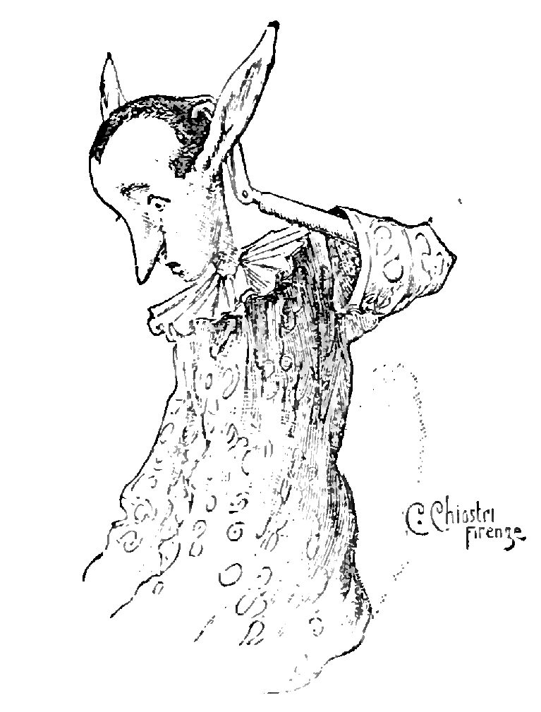 Illustrations from "Le avventure di Pinocchio, storia di un burattino", Carlo Collodi, Bemporad & figlio, Firenze 1902 (Drawings and engravings by Carlo Chiostri, and A. Bongini)